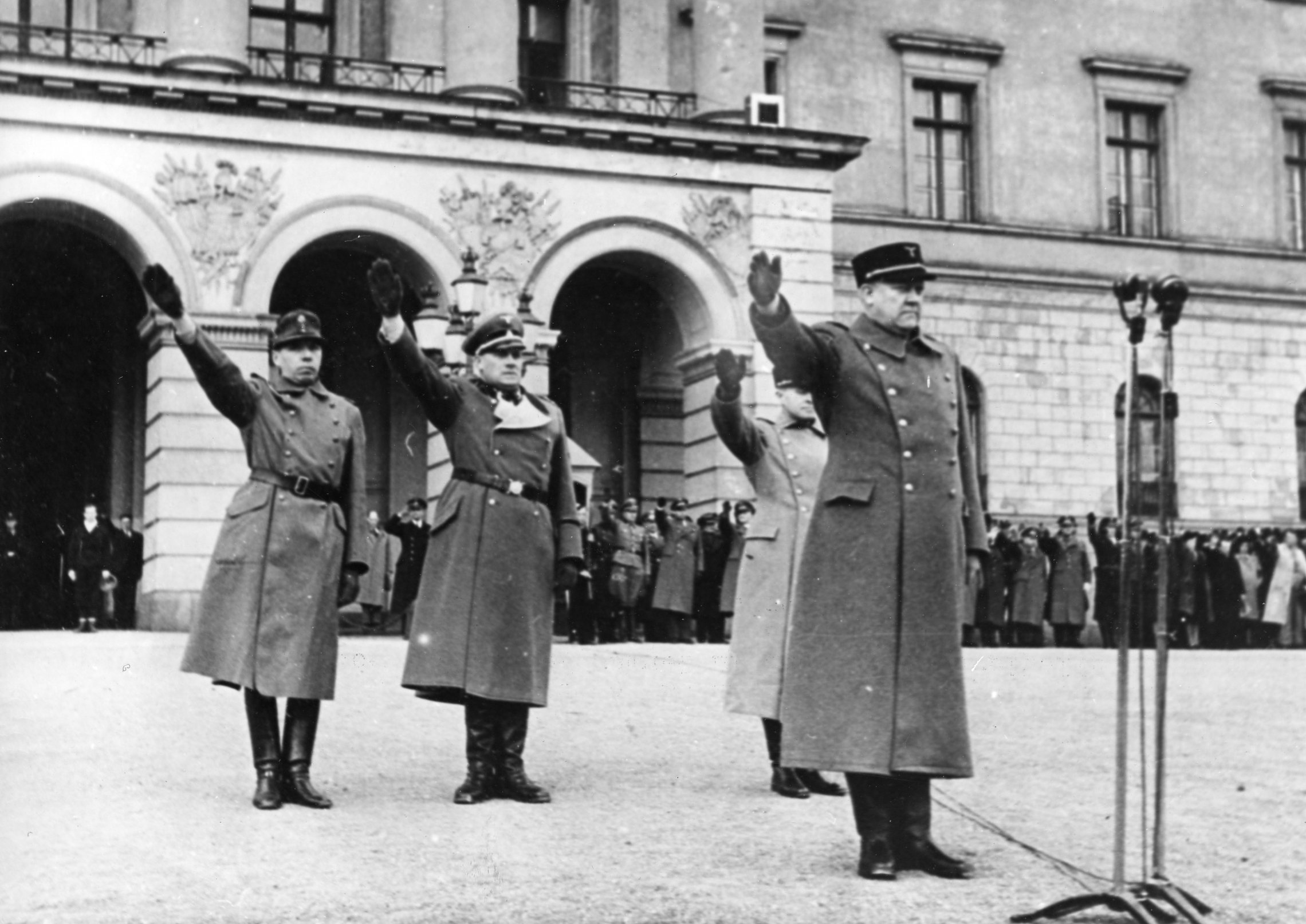 RA/PA-1209/Ue 96/ (img086)